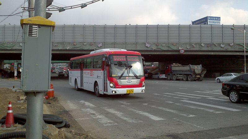 용인시내버스5001-1번